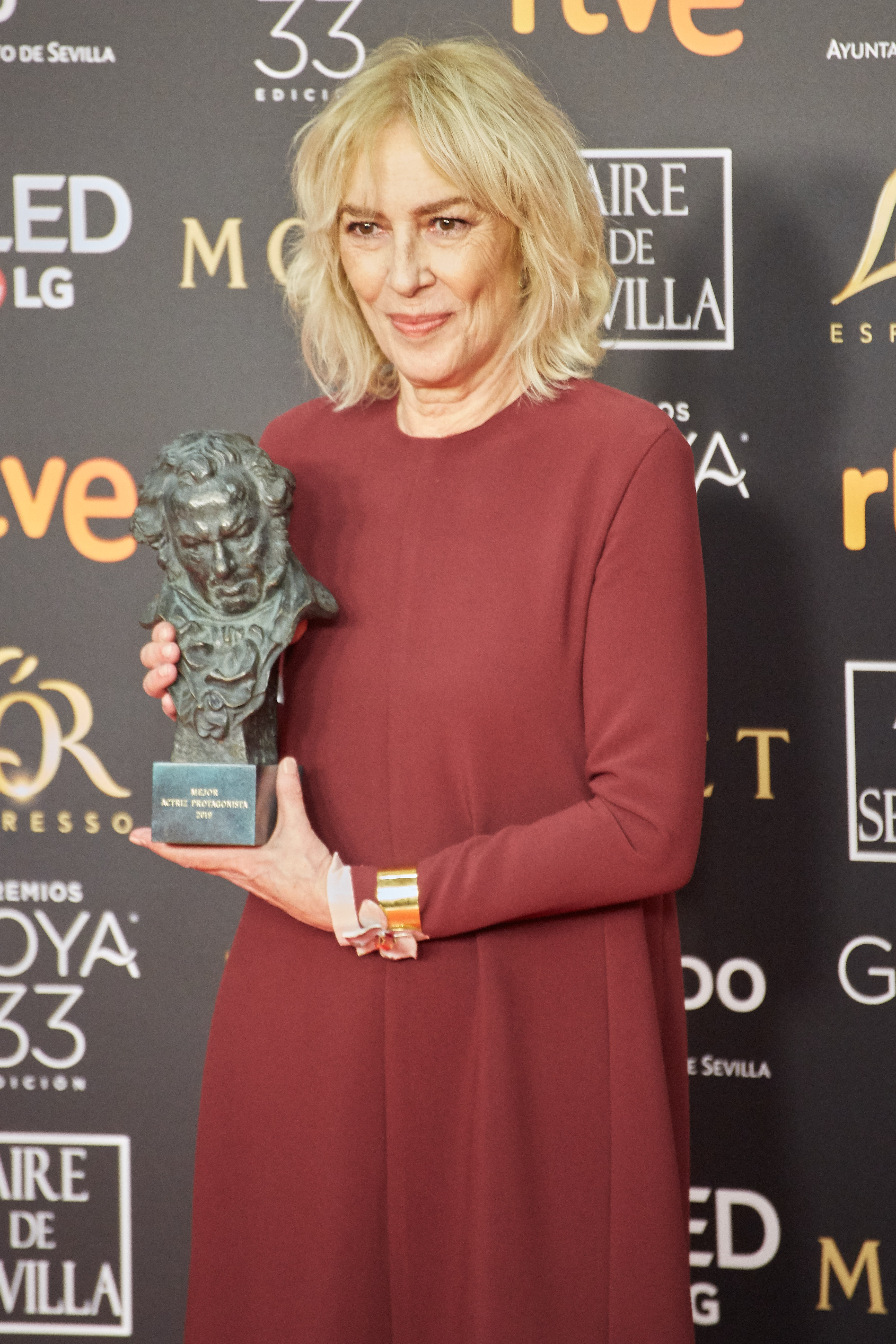 Susi Sanchez exhibiendo su Goya a la Mejor Interpretación Femenina Protagonista por La enfermendad del domingo